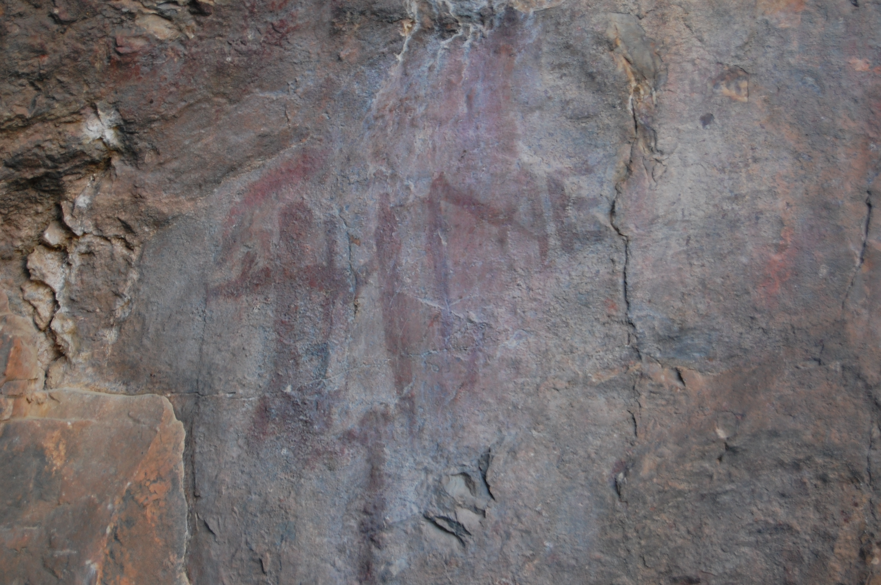 Pinturas Rupestres, Río Ruecas Alto, Cueva Chiquita, La Nutria, Cañamero This is a photography of a Site of Community Importance in Spain with the ID: ES4320029. Natura2000 entry, EEA entry